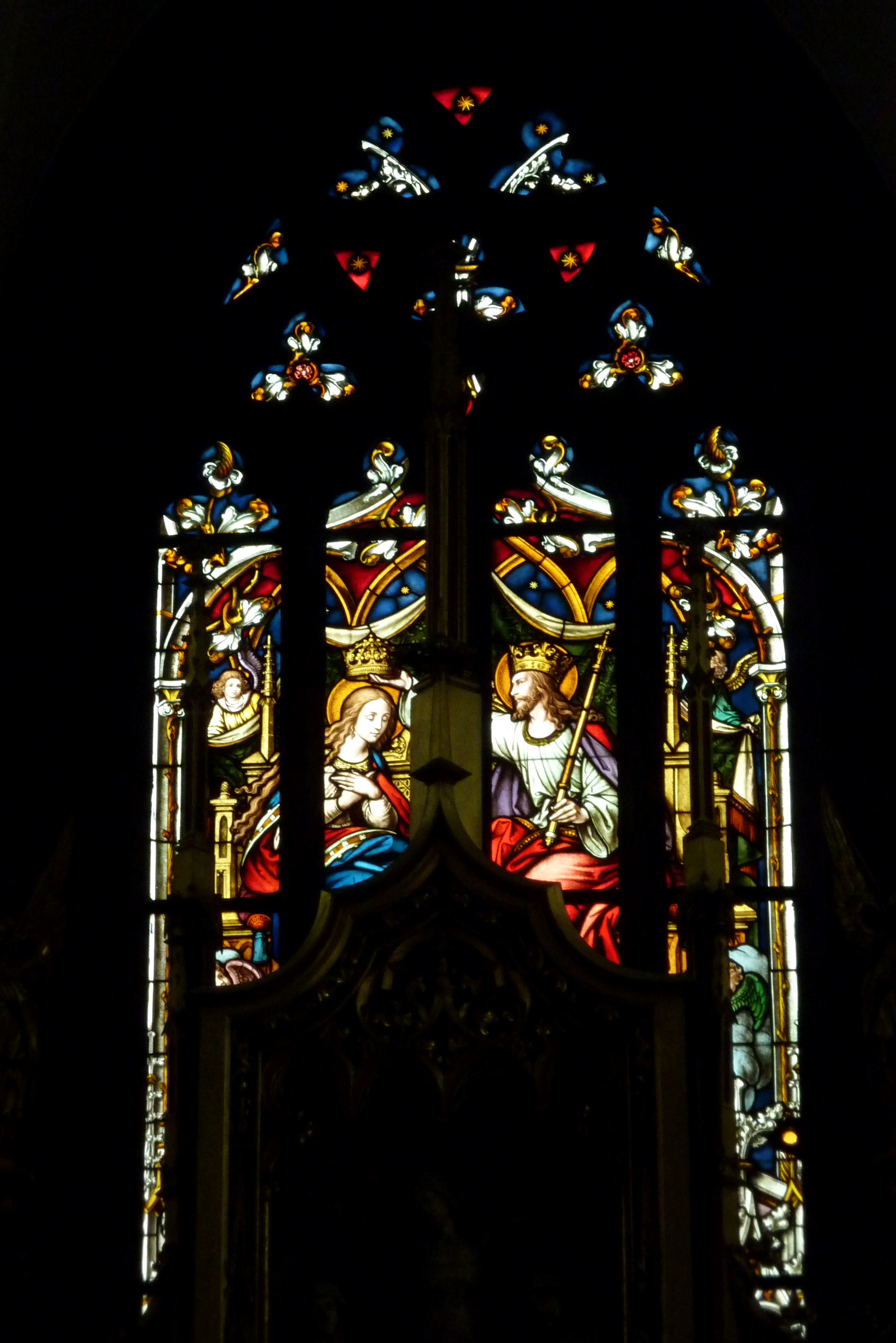 Bleiglasfenster in der katholischen Pfarrkirche St. Michael in Lohr am Main im Landkreis Main-Spessart (Bayern), Darstellung: Krönung Mariens